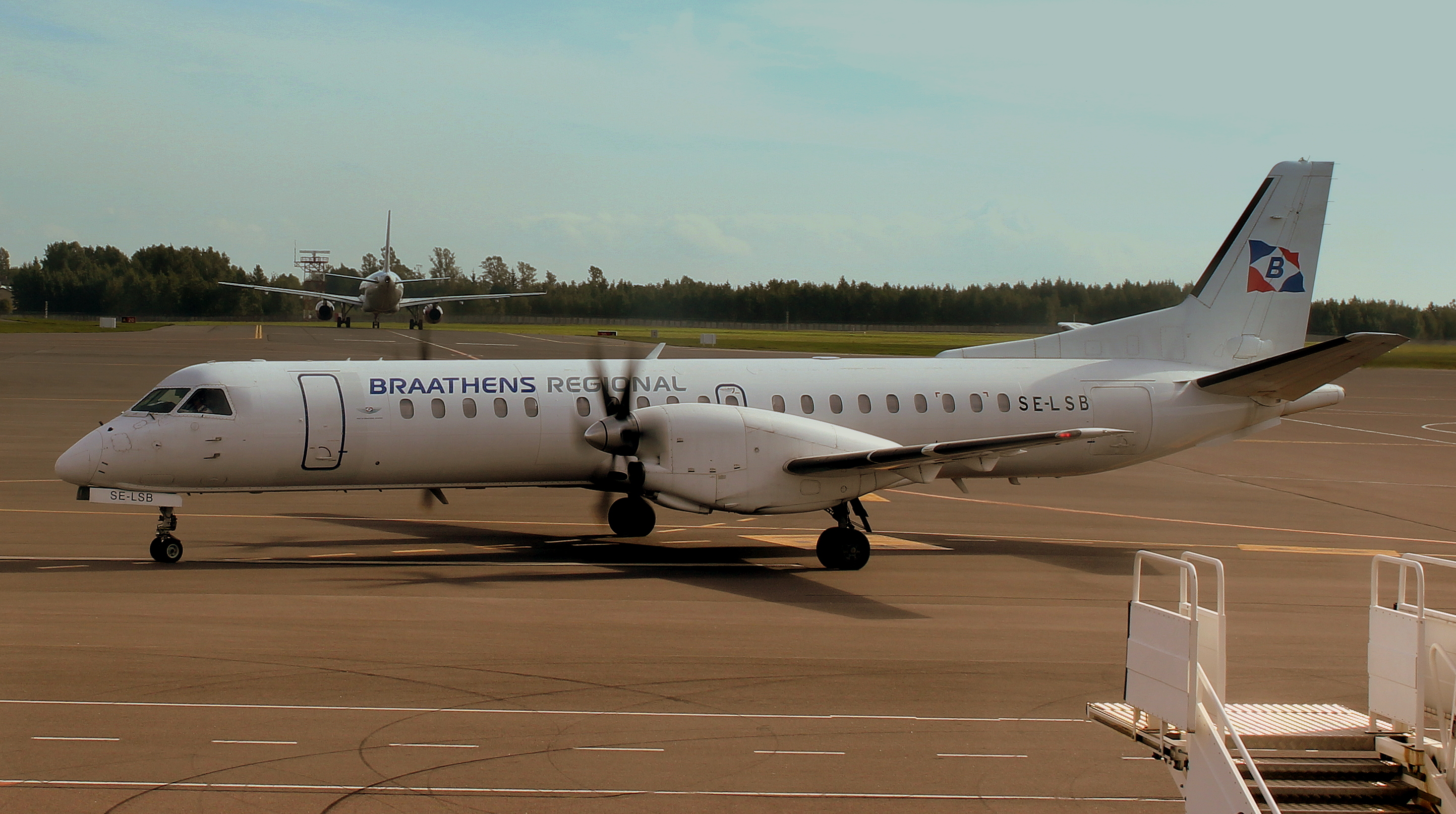 BRAATHENS REGIONAL SAAB 2000 SE-LSB AT VILLINUS AIRPORT LITHUANIA SEP 2013